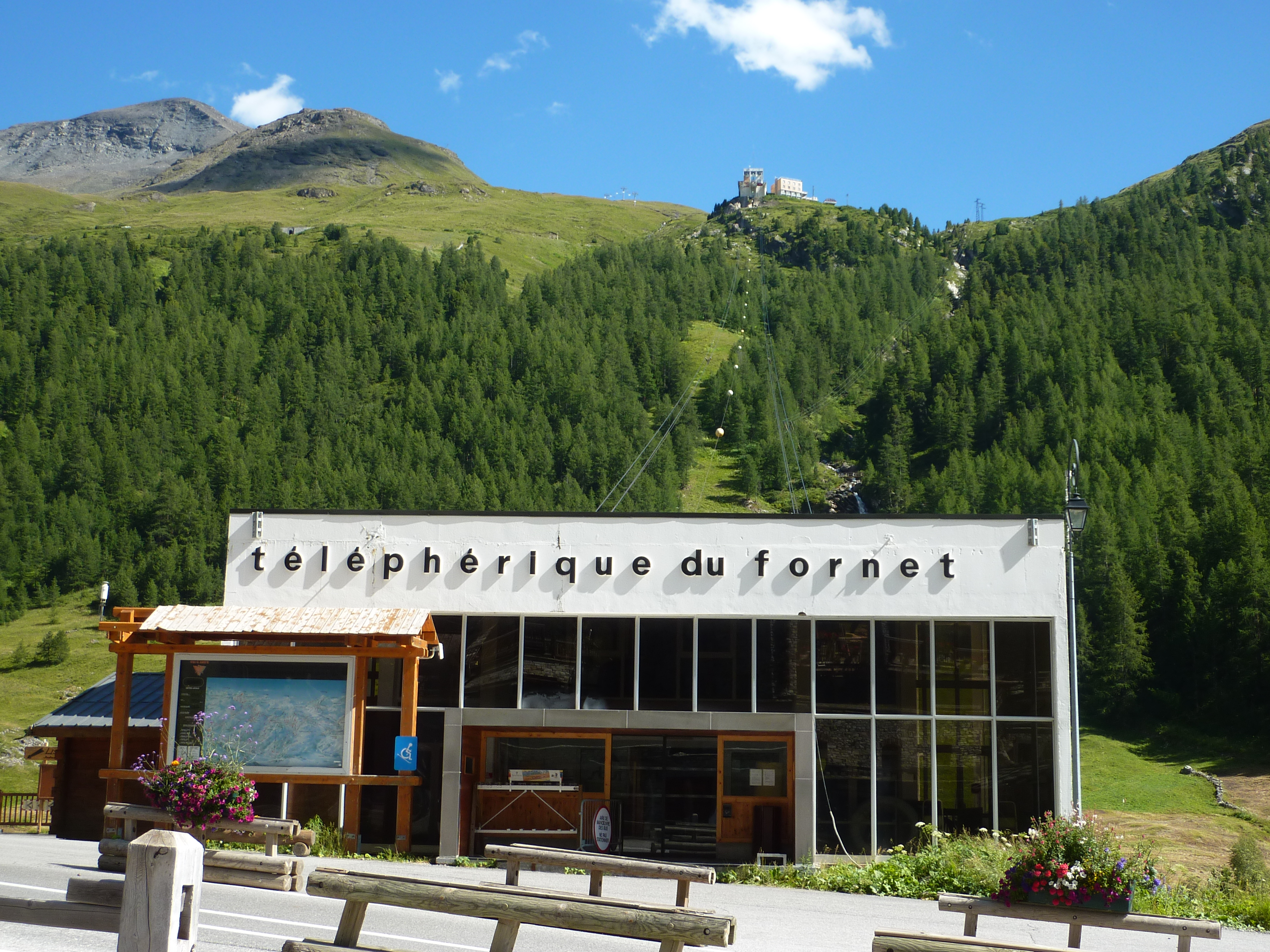 Téléphérique du Fornet à Val d'Isère (73 - FRANCE). Photographie du 31/07/2012.